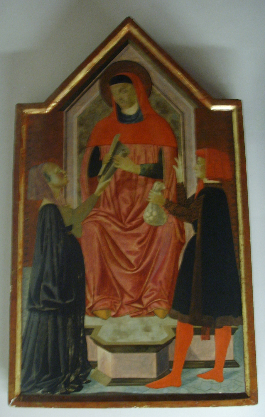 Opera del duomo (FI), sant'Ivo, seconda metà del XV secolo